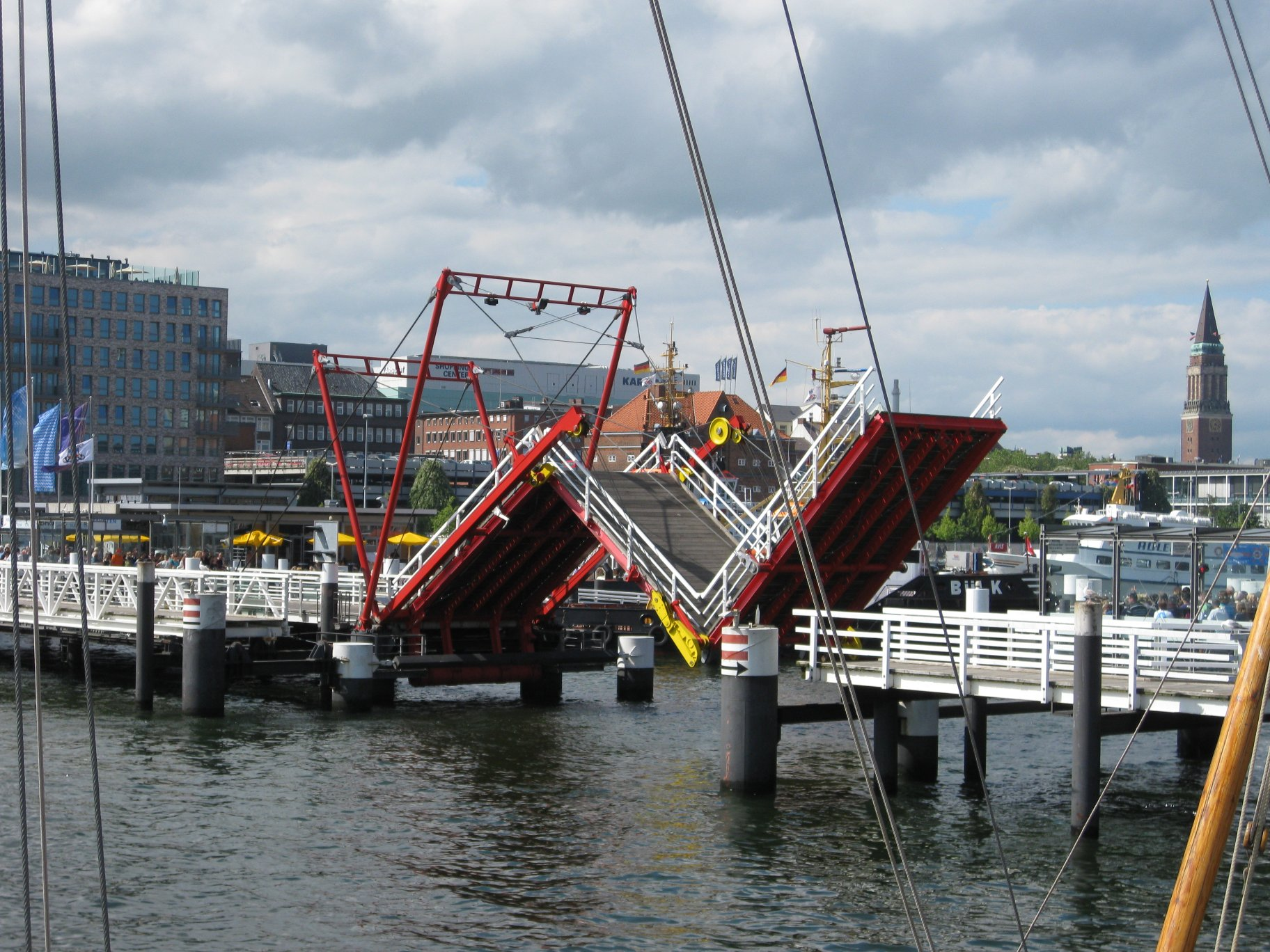 Die Kieler Hörnbrücke in Aktion